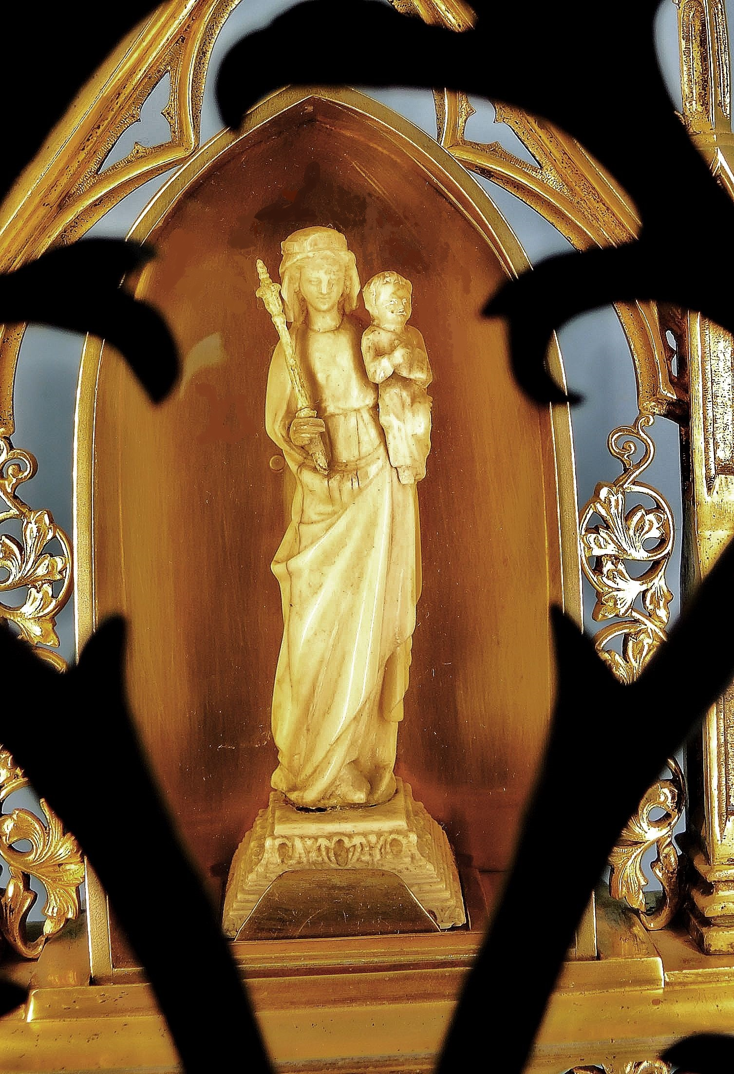 Statuette de Notre-Dame, en ivoire, dans l'église Notre-Dame de Neunkirch.